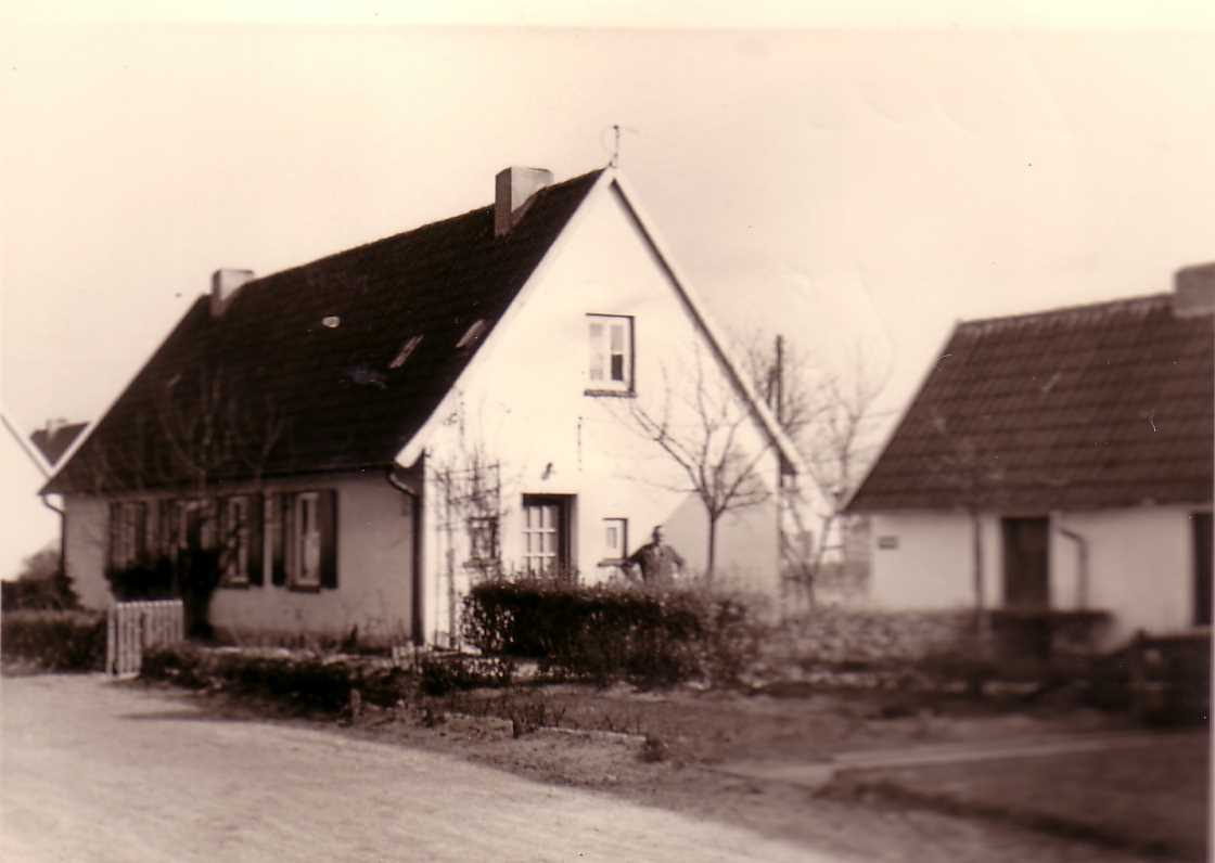 Typisches Siedlungshaus in der Rübezahlsiedlung Epe in Westfalen 1956